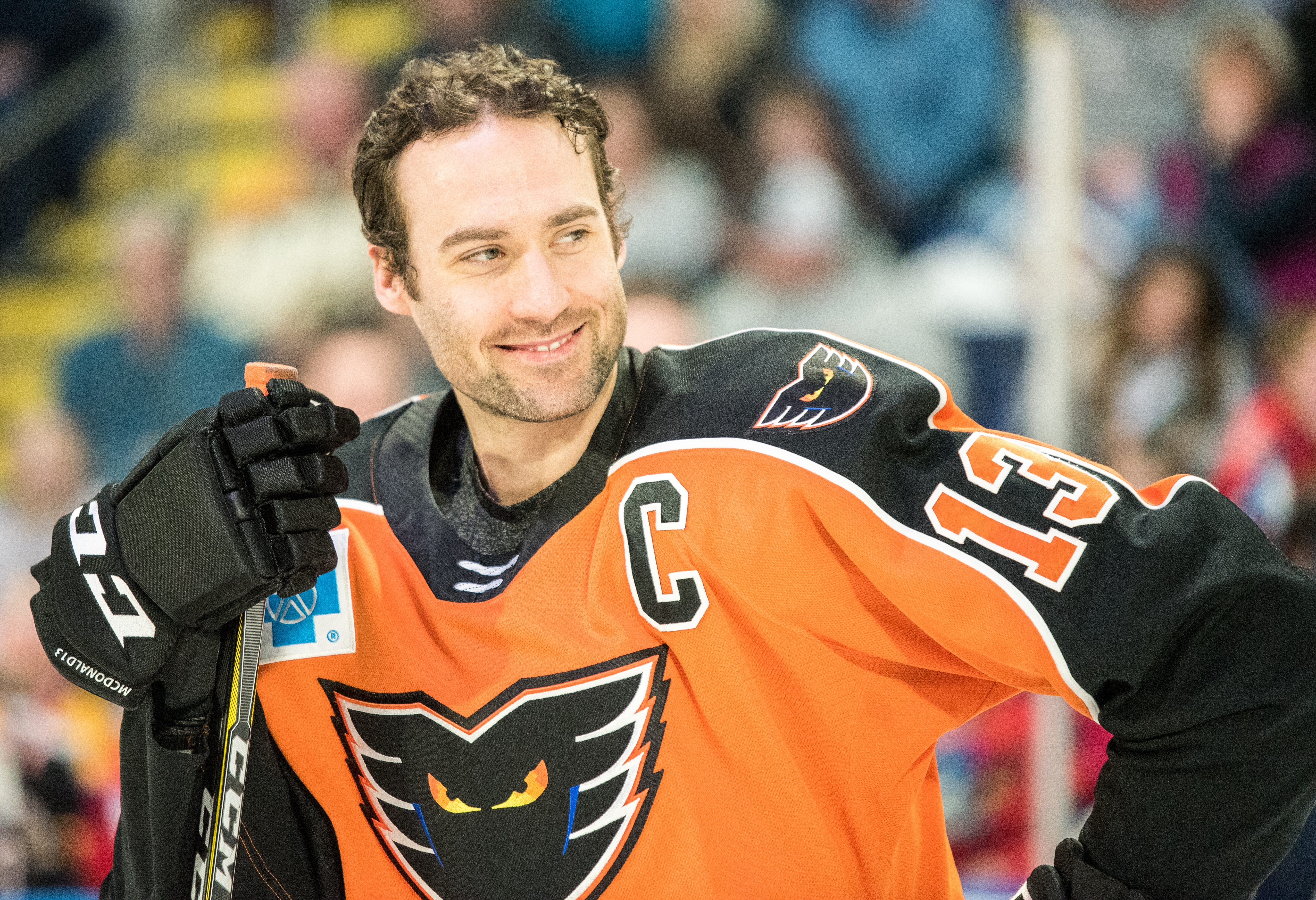 CYW_1345